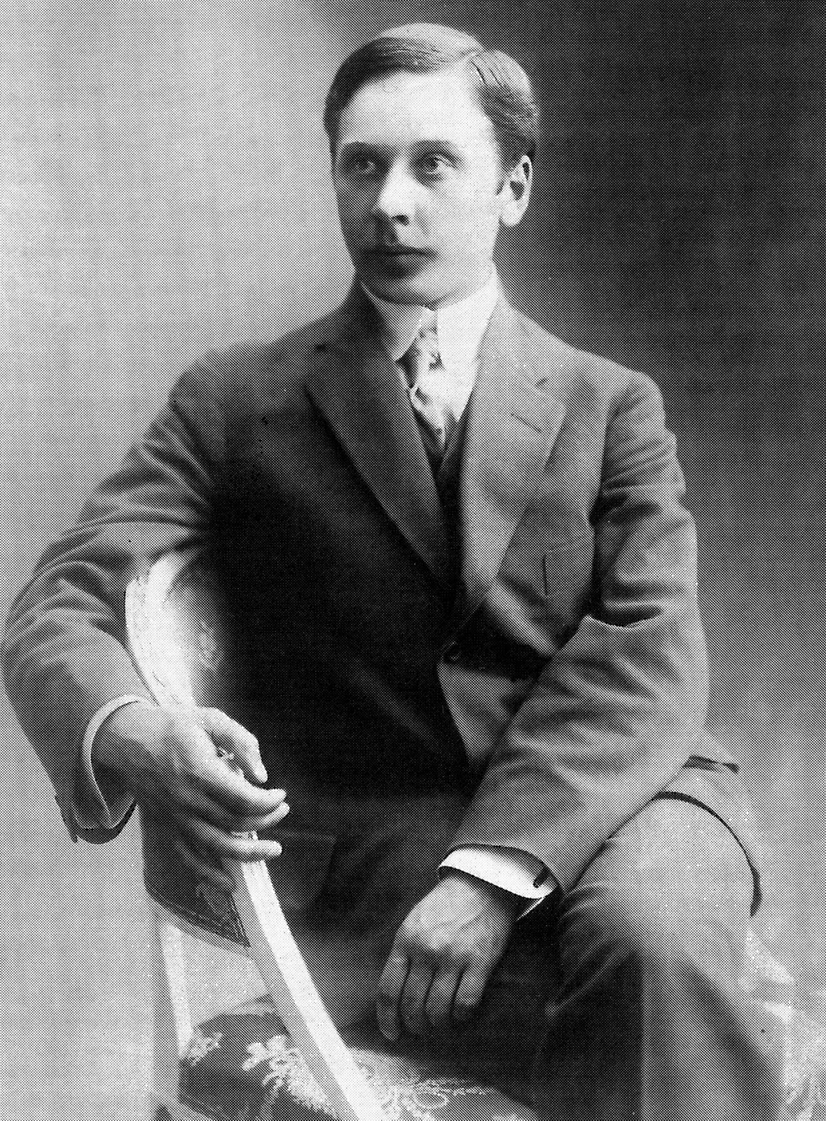 Toivo Niskanen 1910-luvulla